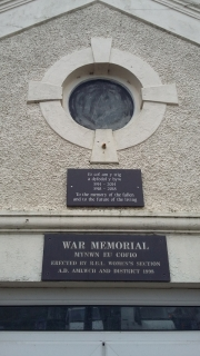 Cofeb Amlwch 1